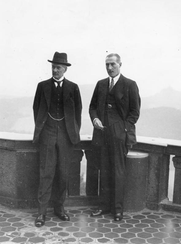 Scherl: Der Besuch des englischen Ministerpräsidenten in Deutschland Ministerpräsident Chamberlain und der britische Botschafter Henderson auf der Terrasse des Kurhotels Petersberg, wo Chamberlain während seines zweiten Aufenthaltes in Deutschland wohnte. 23.9.38, 12632-38